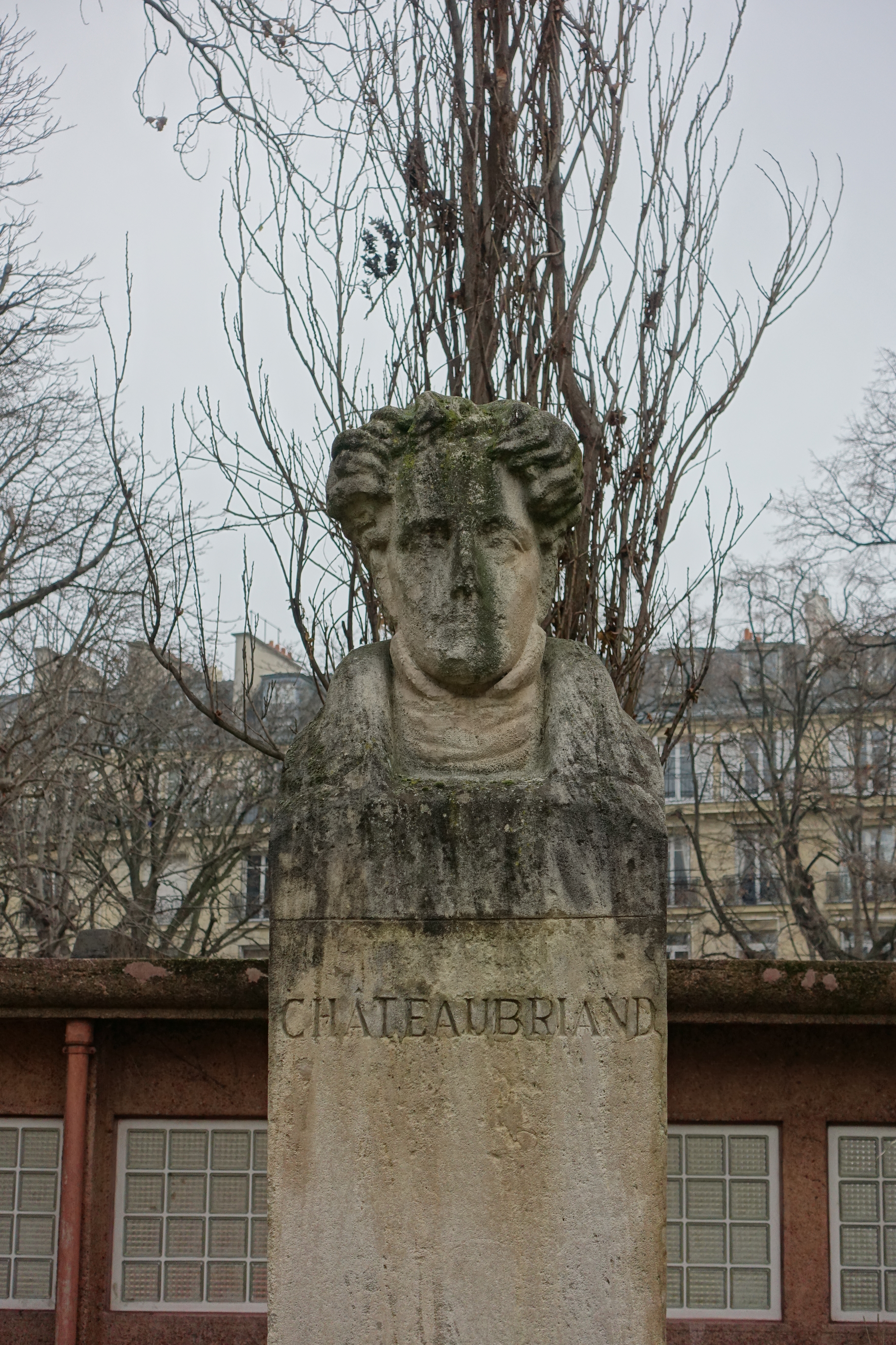 Bust of Chateaubriand designed by Maurice Gambier d'Hurigny @ Square des Missions Étrangères @ Paris Square des Missions-Étrangères, 105 rue du Bac, 75007 Paris, France.